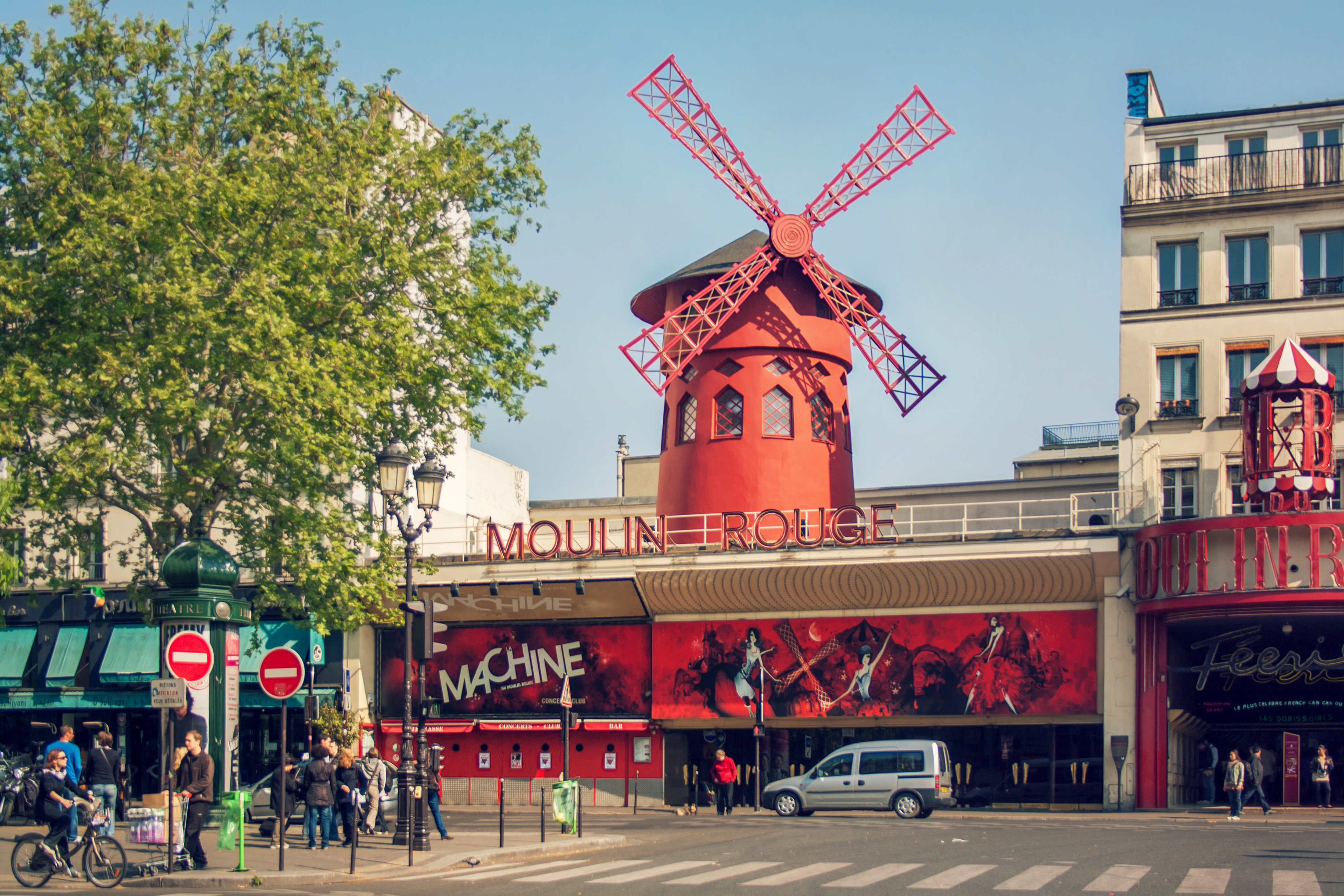 París, Francia